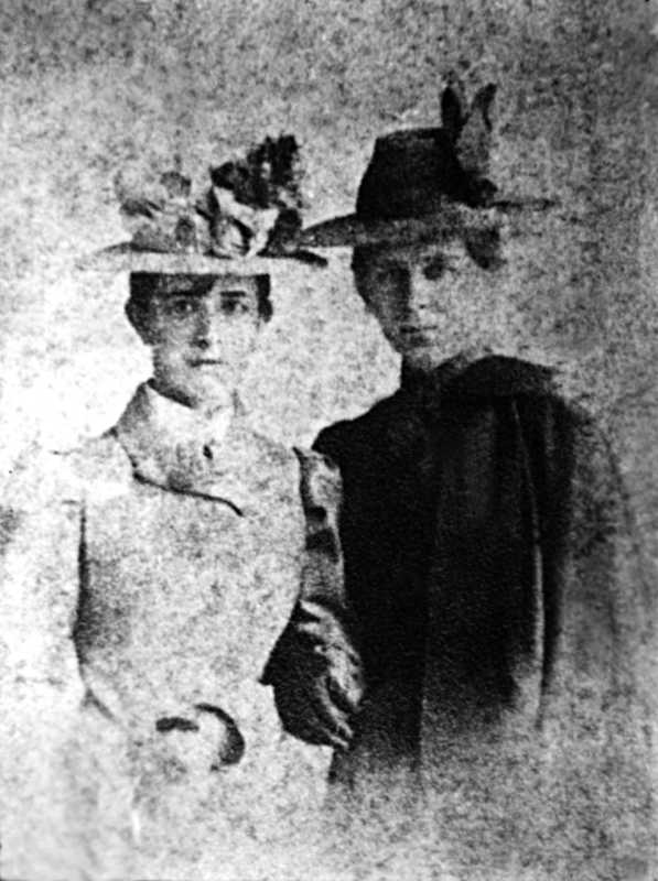 Ольга Косач (ліворуч) та Леся Українка (праворуч). Берлін.